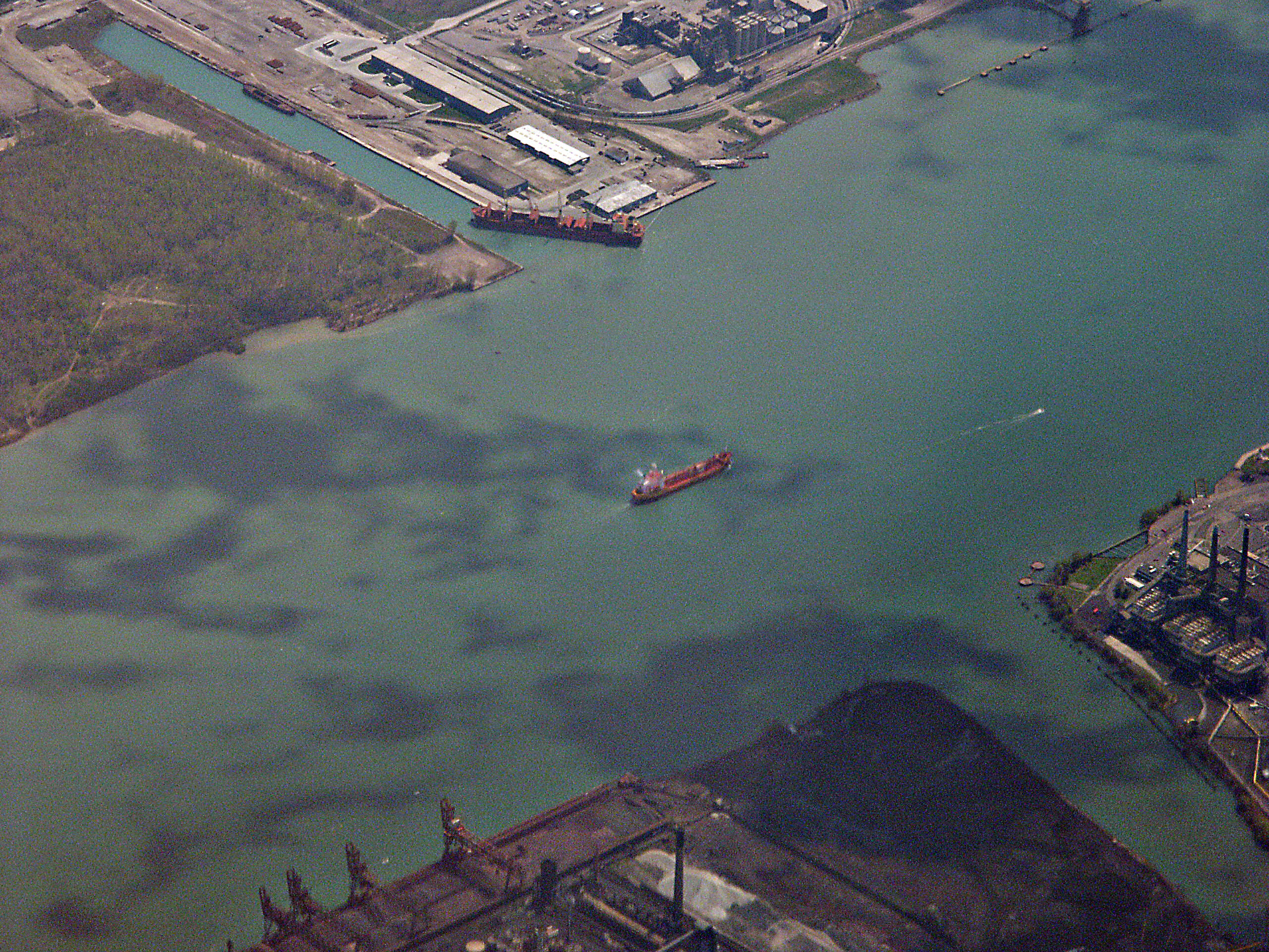 Detroit River, Michigan, USA.2005-05-07_12-46-34.detroit.river